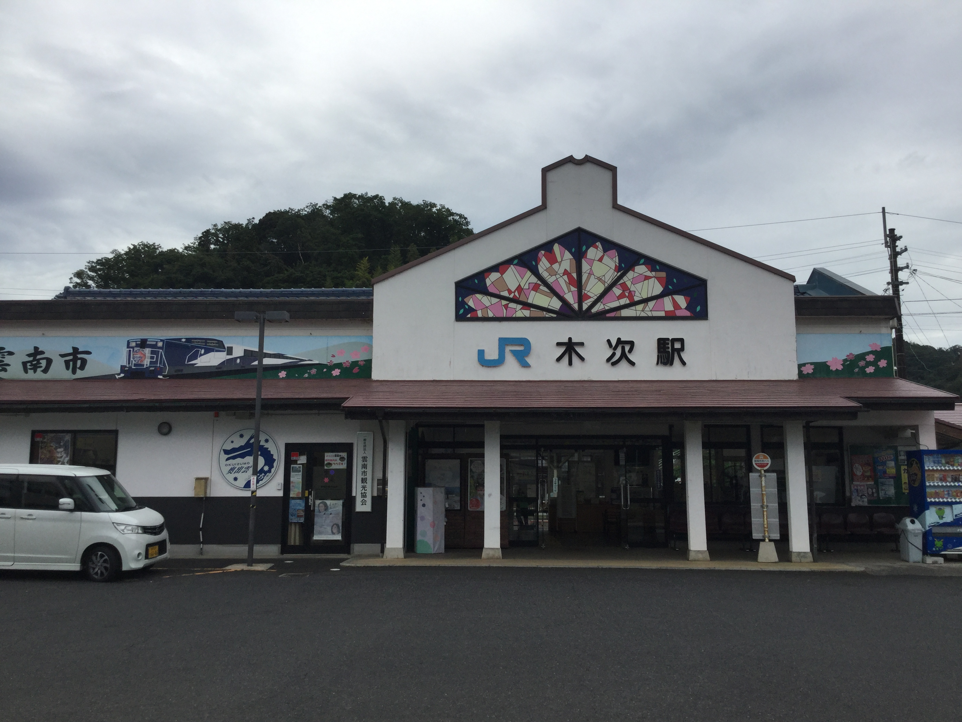 Kisuki Station (木次駅)